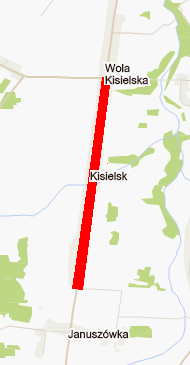 of village Kisielsk Gmina Stoczek Łukowski, Łuków County, Lublin Voivodeship, Poland